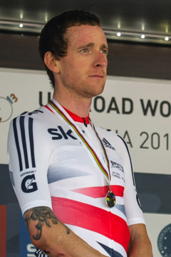 Miércoles 25 de septiembre de 2013 CRI Varones Élite Foto: ©Luis Barbosa 1° Tony Martin 1:05:36” 2° Bradley Wiggins +46” 3° Fabian Cancellara +48”